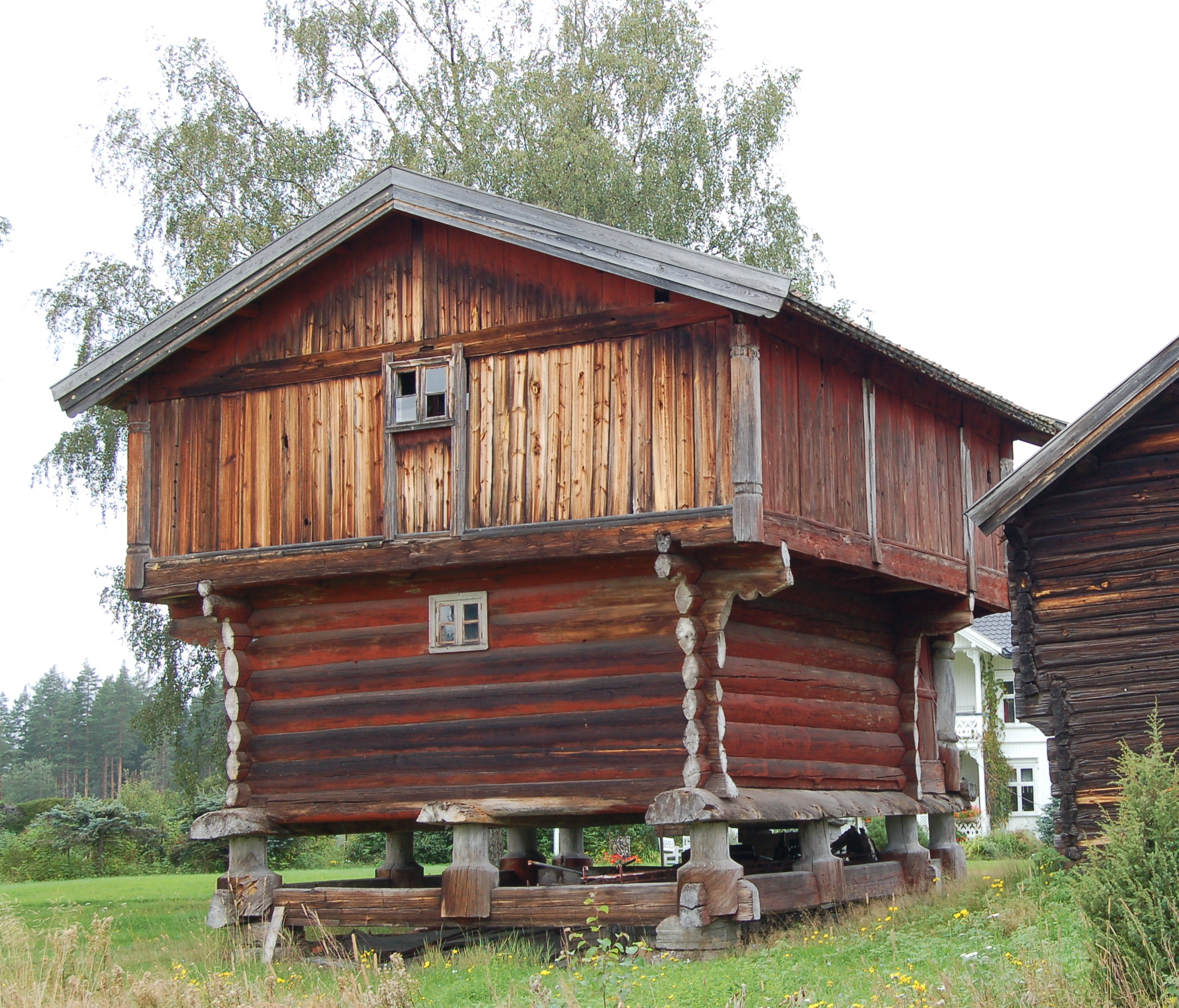 Vangestadloftet